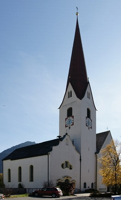 Dekanatskirche hll. Petrus und Paulus mit Kerkerkapelle